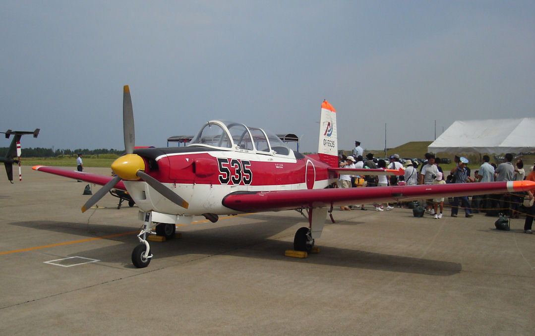 投稿者撮影 2005/09/18 富士重工 T-3練習機